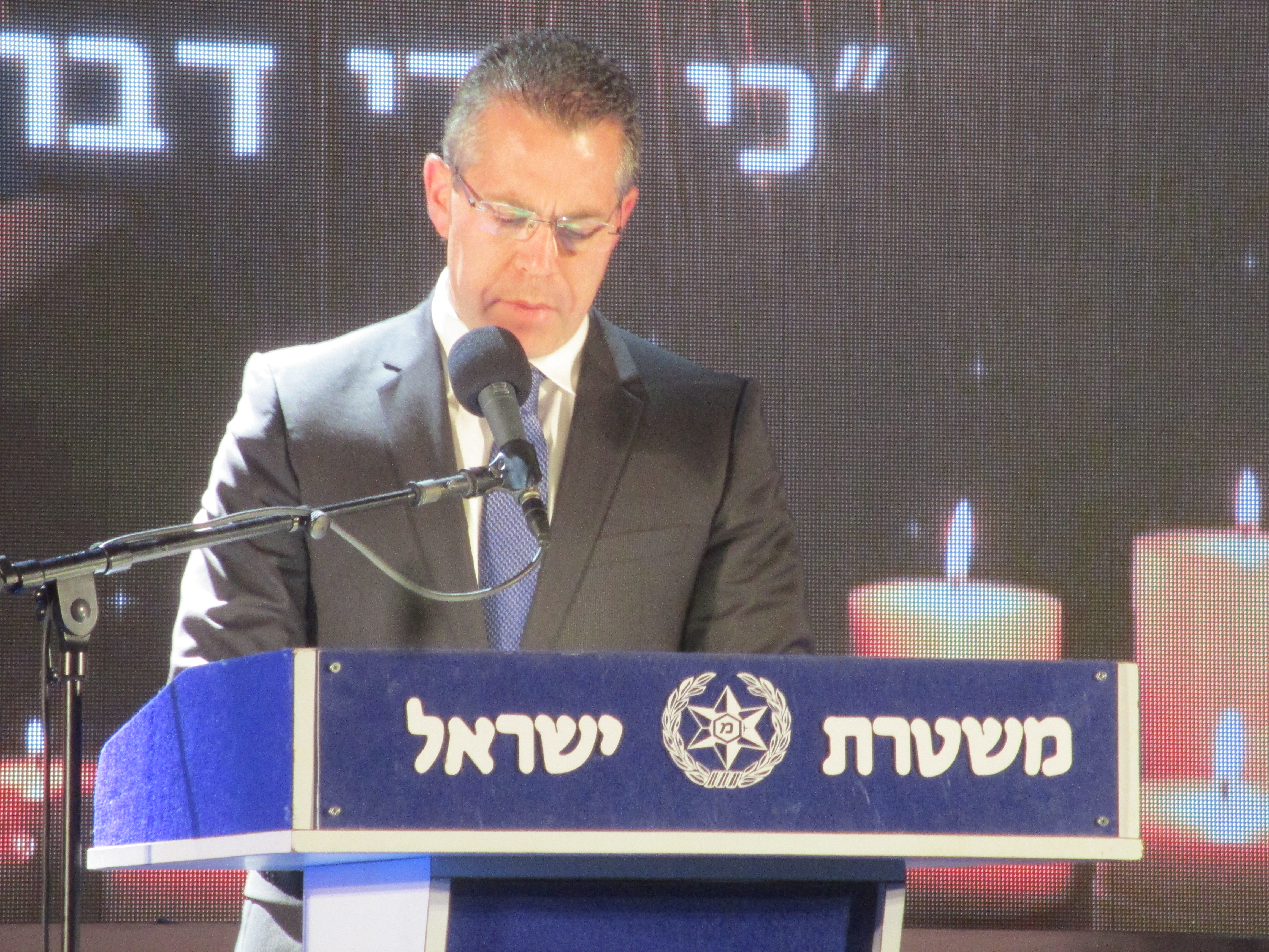 השר גלעד ארדן בטקס אזכרה לחללי משטרת ישראל